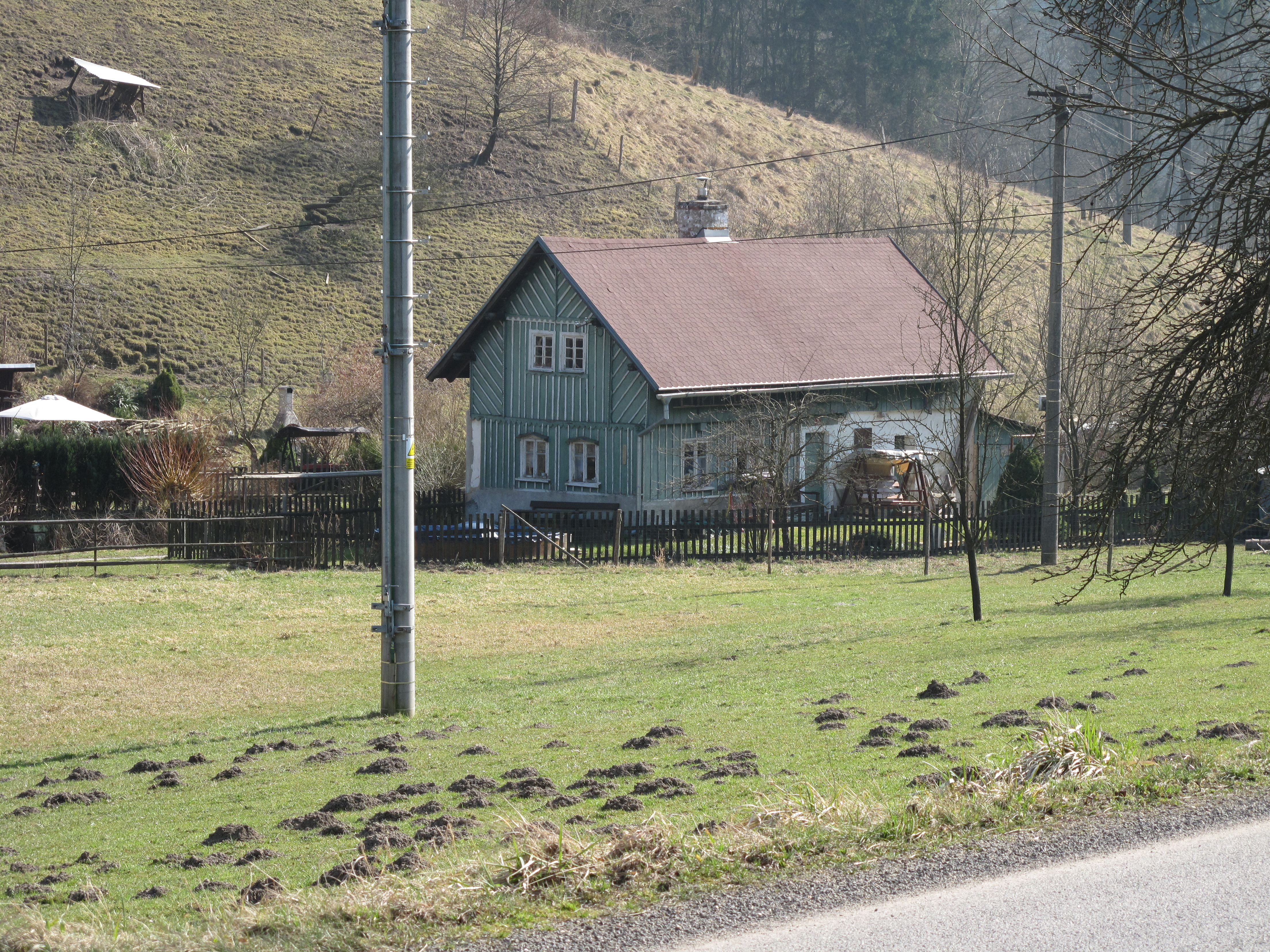 Roubenka v Loukovičkách. Okres Liberec, Česká republika. Object location50° 38′ 43.66″ N, 14° 59′ 33.36″ E